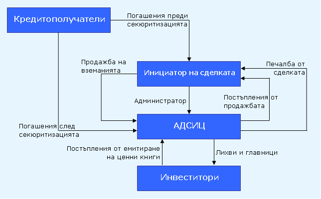 Секюритизация